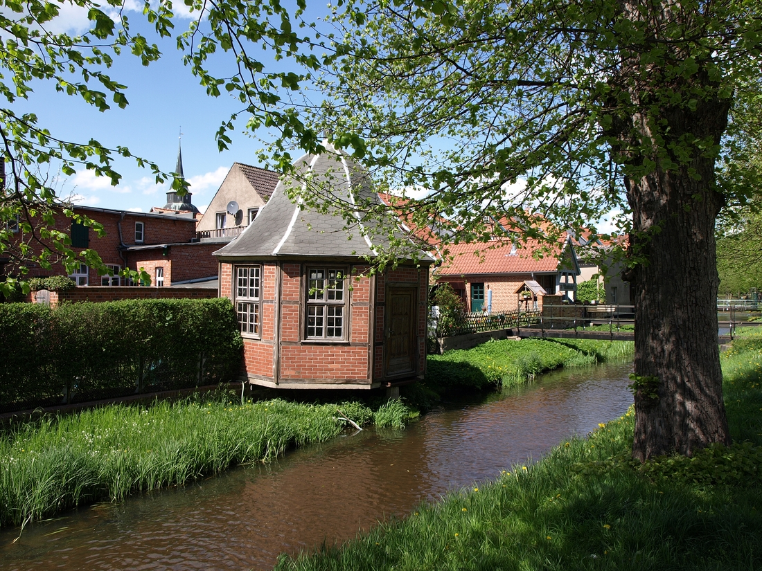 Barock Pavillon, zur 725 Jahr Feier restauriert